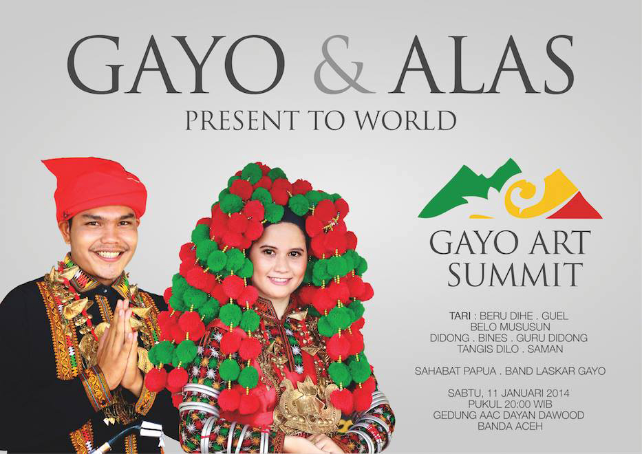 Suku Alas